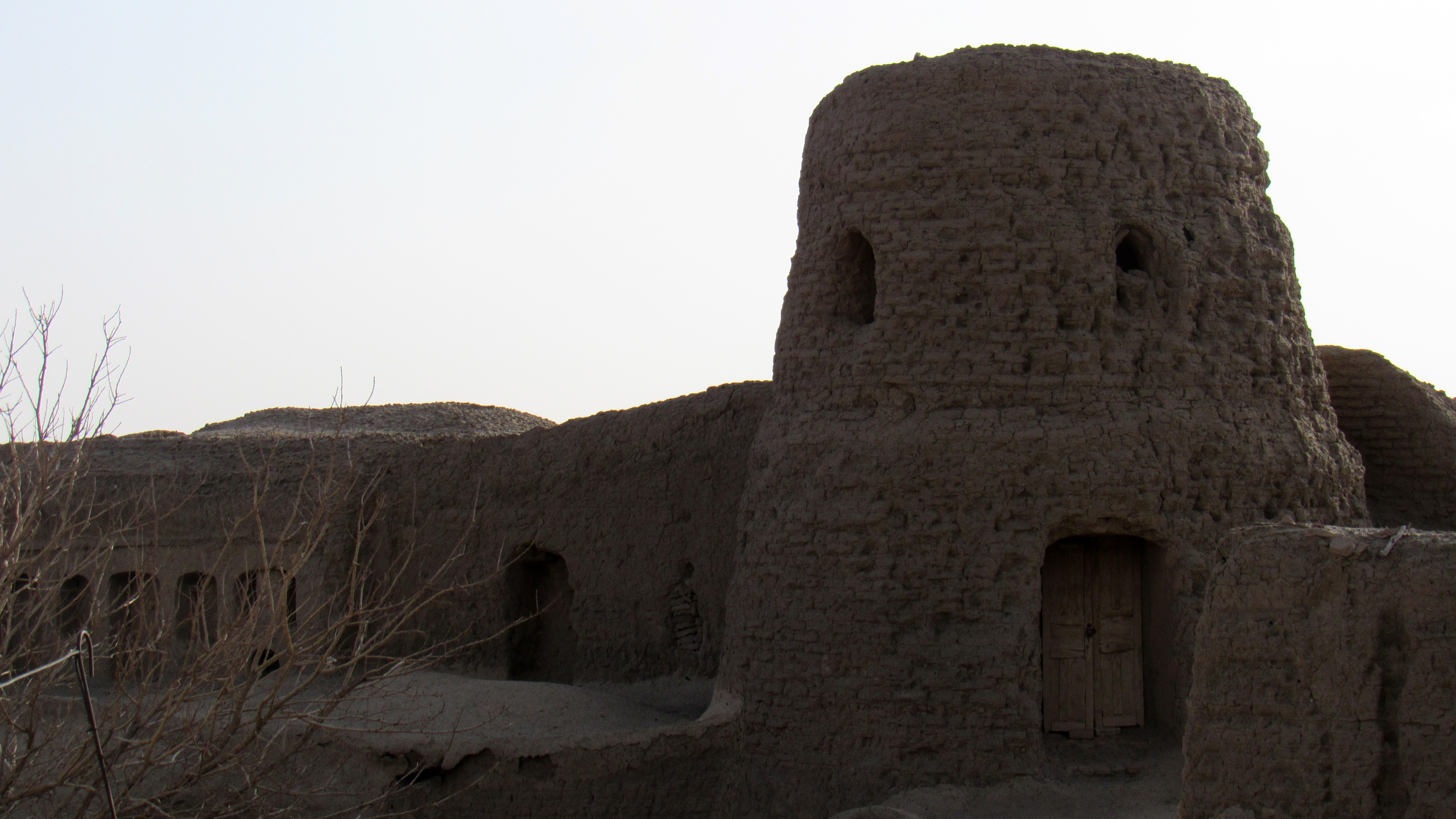 قلعه کهنه زعفرانیه